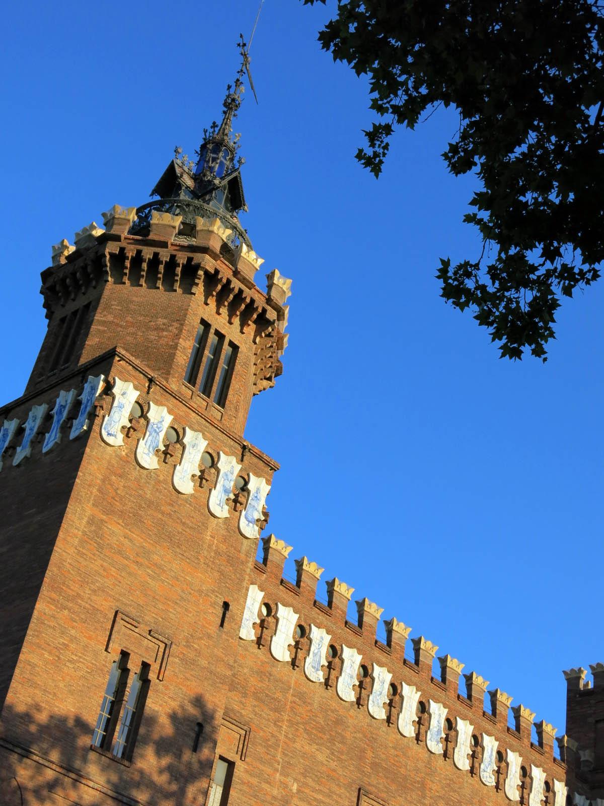 Museu de Zoologia (Barcelona) Object location41° 23′ 17.53″ N, 2° 11′ 00.88″ E